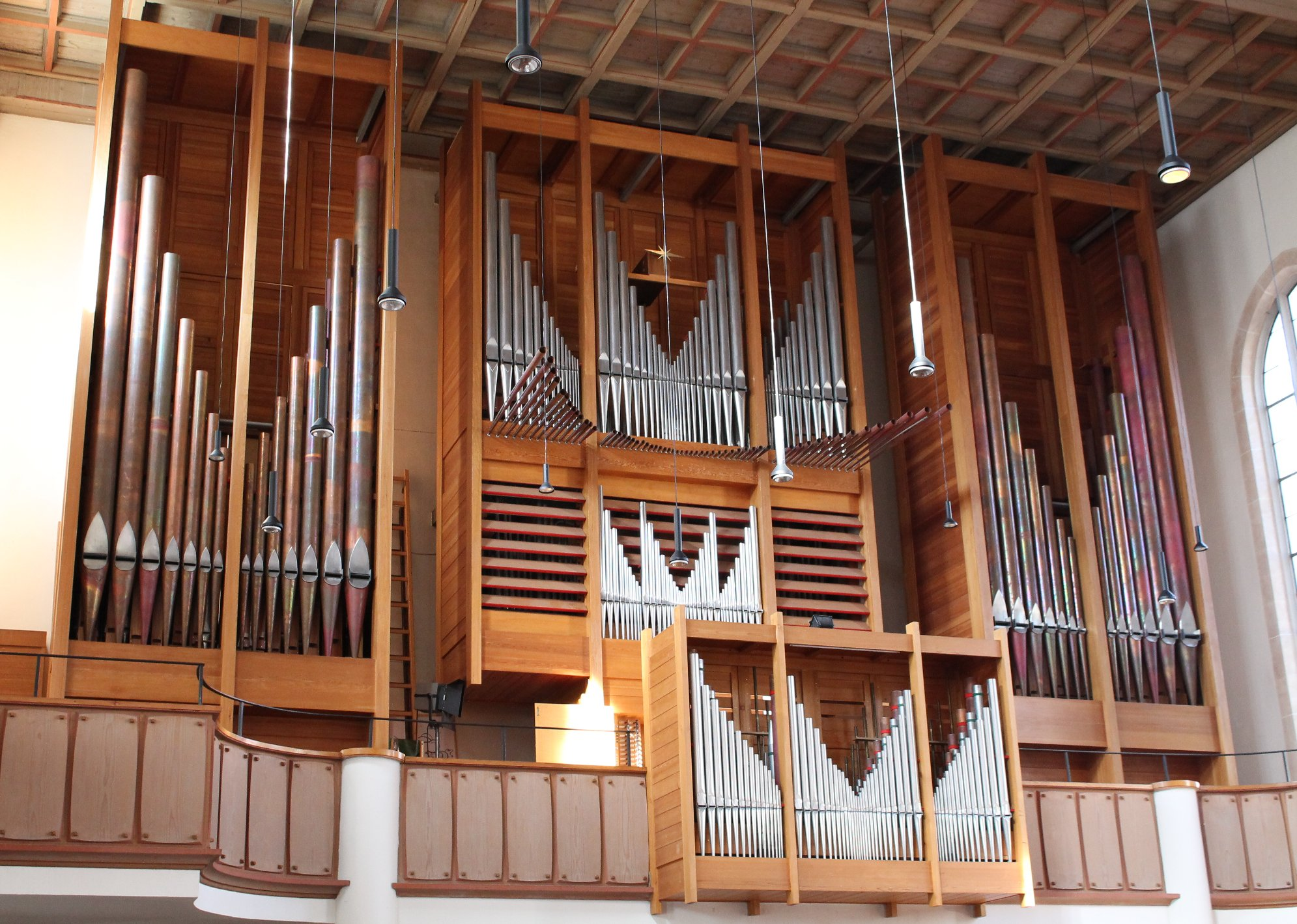 Orgel der Christuskirche in München-Neuhausen, Bayern, Deutschland. (1966, Rieger Orgelbau, III/48)